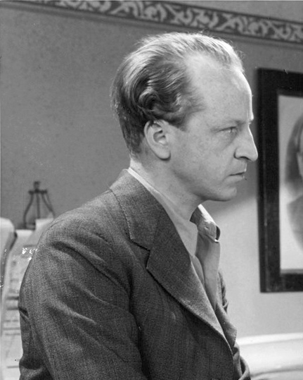 Gillis Blom i filmen "Ryska snuvan".